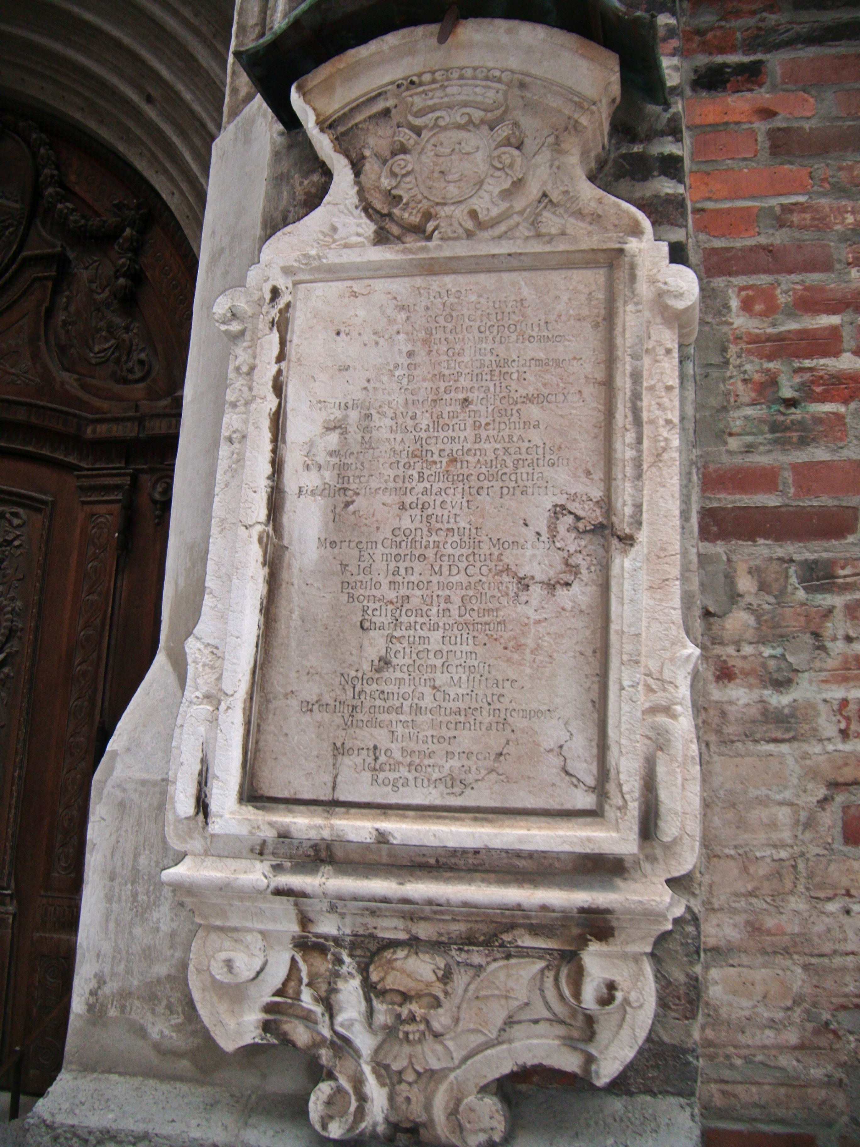 Heinrich Vambes de Florimont (1663-1752), Bayerischer Generalfeldzeugmeister, Epitaph Frauenkirche München